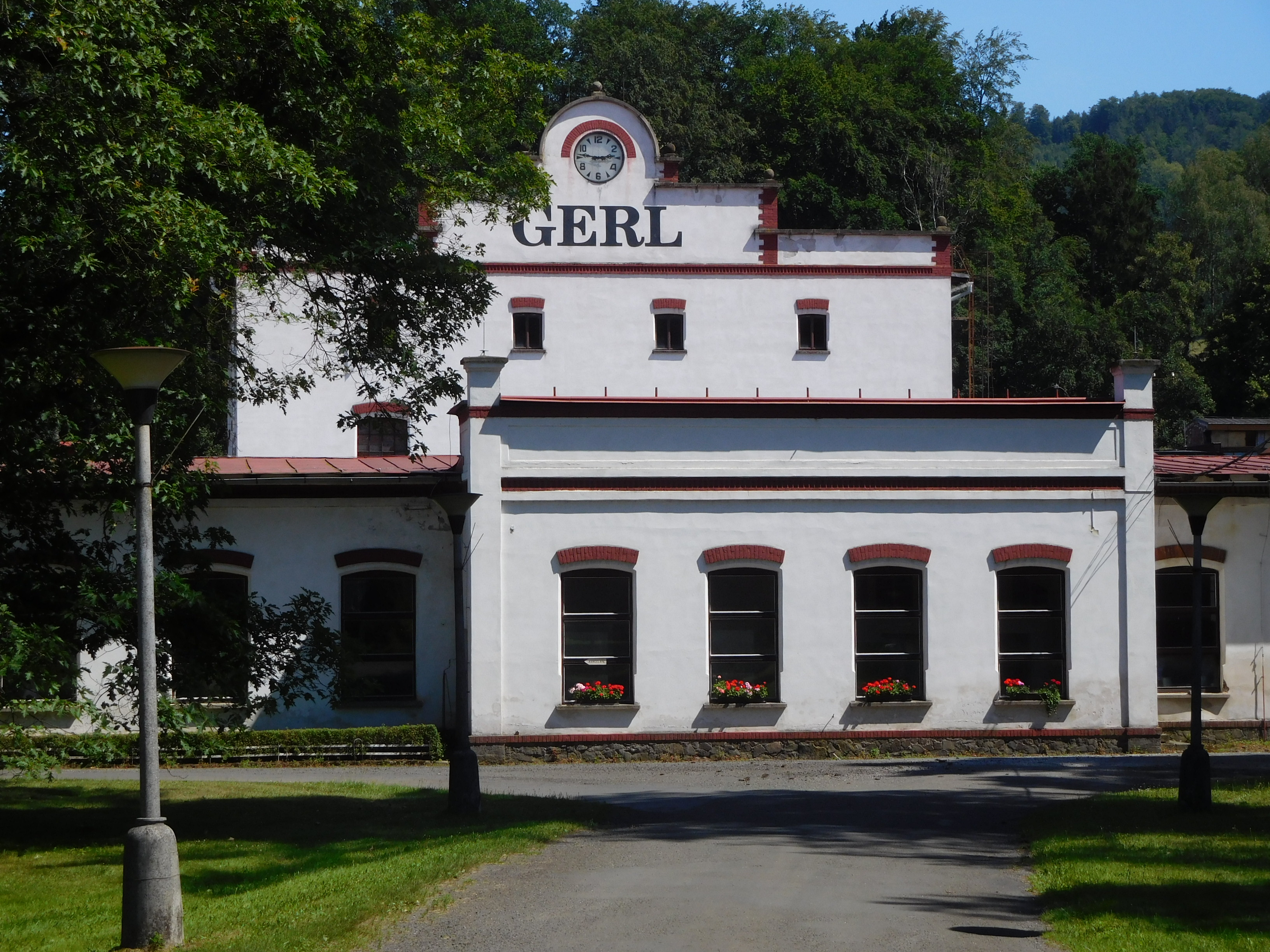 Háje nad Jizerou - textilka GERL